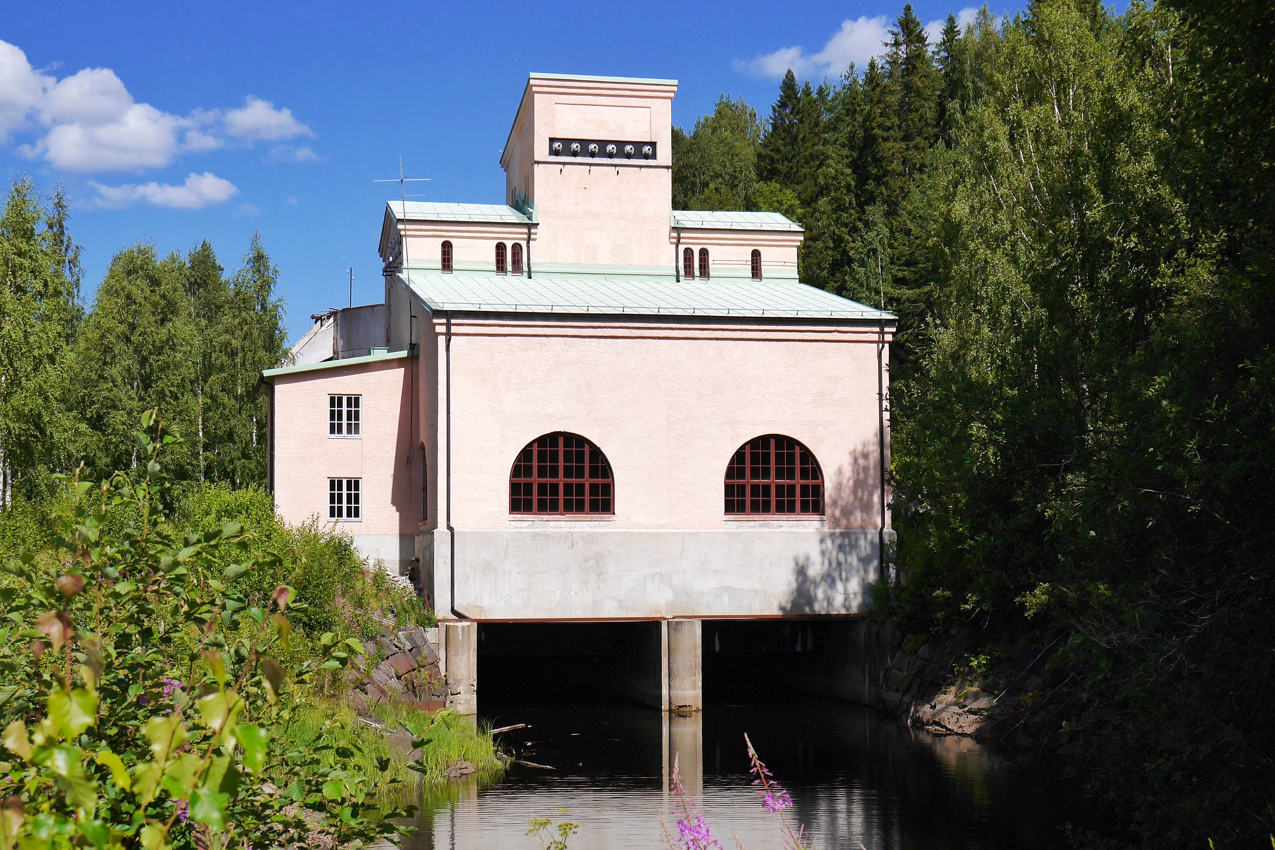 Sikfors gamla kraftstation, uppförd 1911-1912 och belägen efter Piteälven i byn Sikfors, Piteå kommun. Kraftstationen togs ur bruk 1990. Fallhöjden uppgick till 16 meter och effekten till 6MW. Uppförd i byggnadstegel samt för den tiden helt modern armerad betong och med putsad fasad.